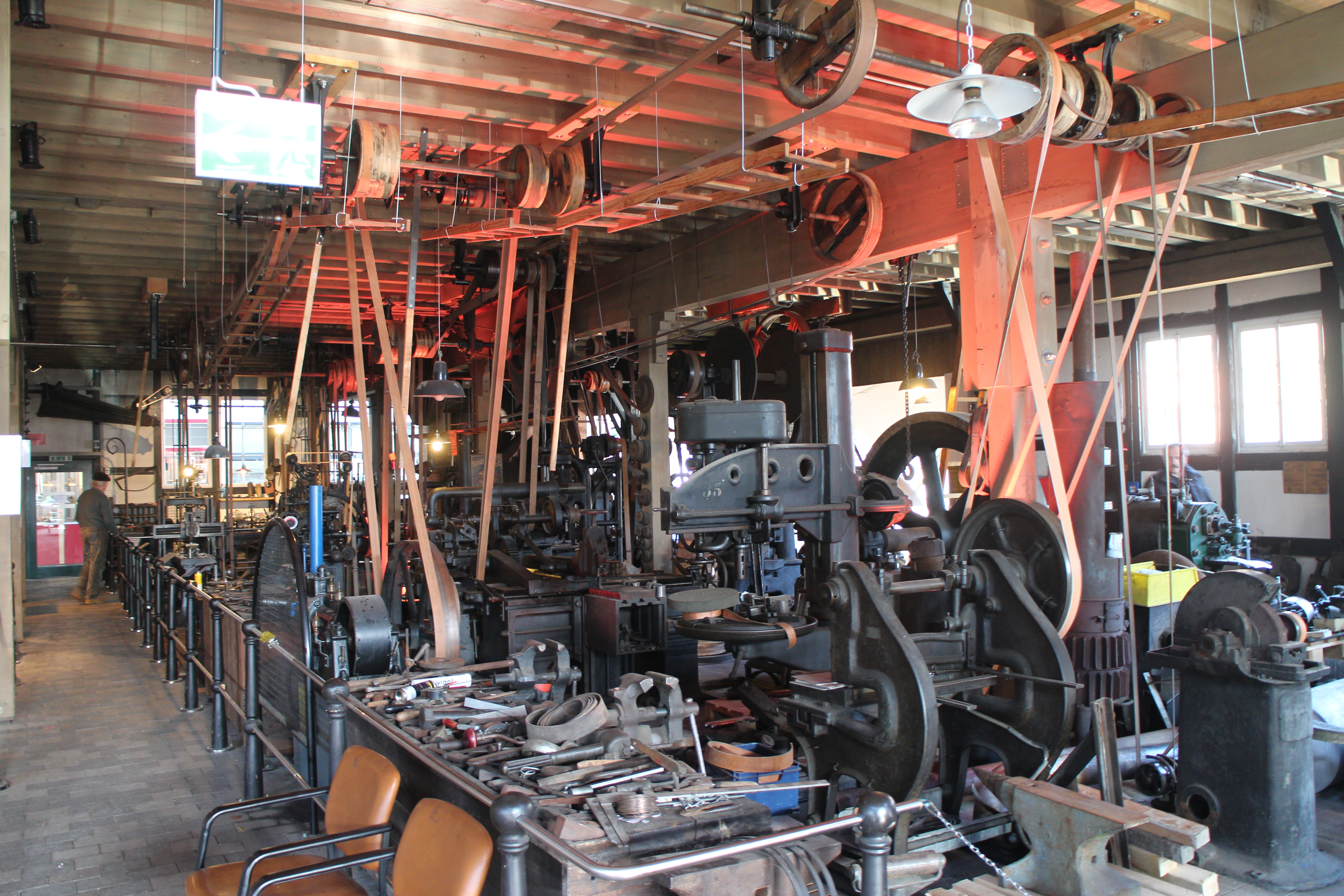 Maschinenwerkstatt im Technikmuseum Freudenberg